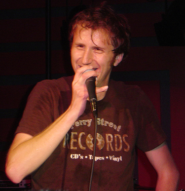 John Reuben in 2005.